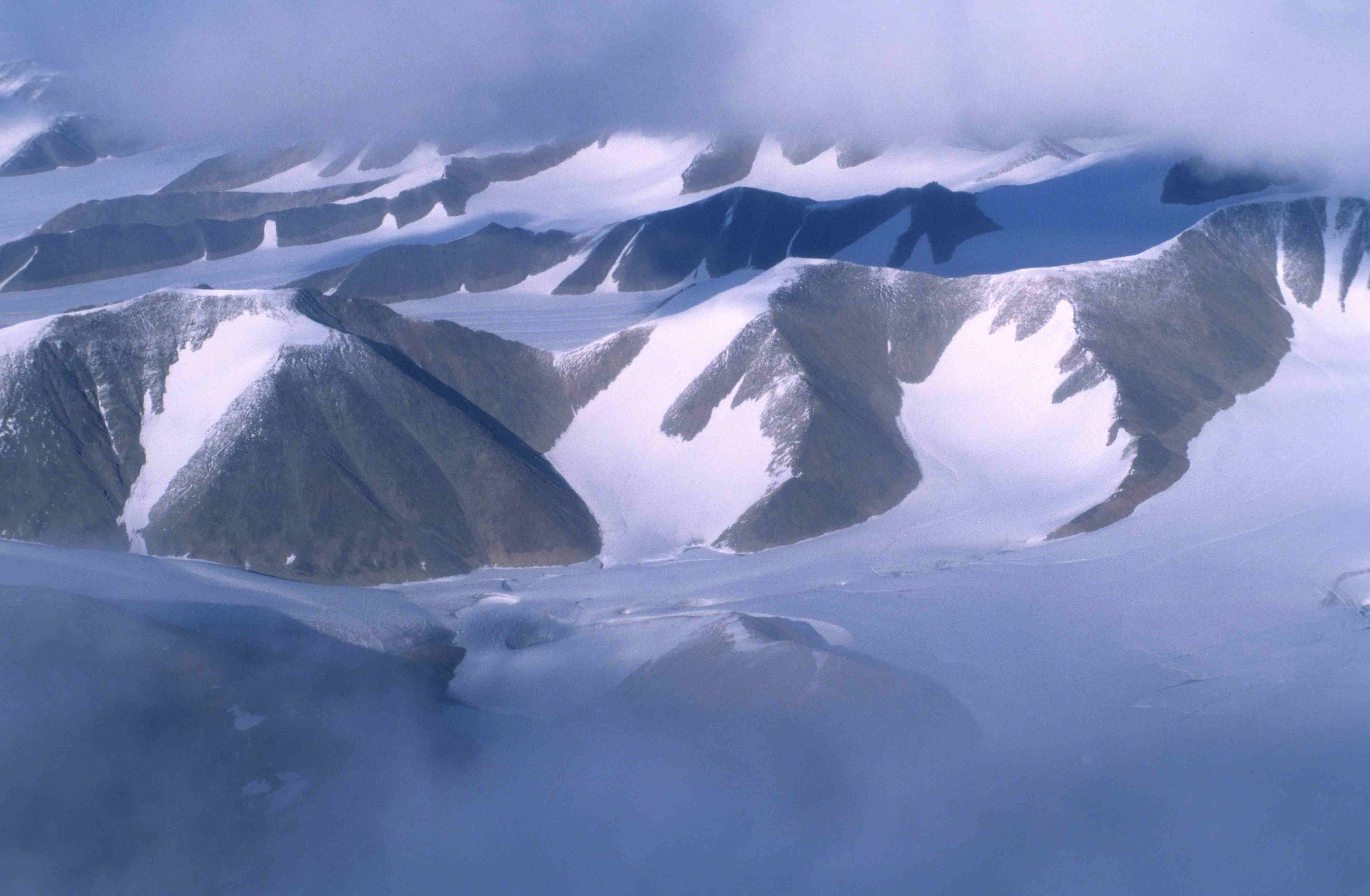 Byam Martin Mountains (Sirmilik National Park, Canada)